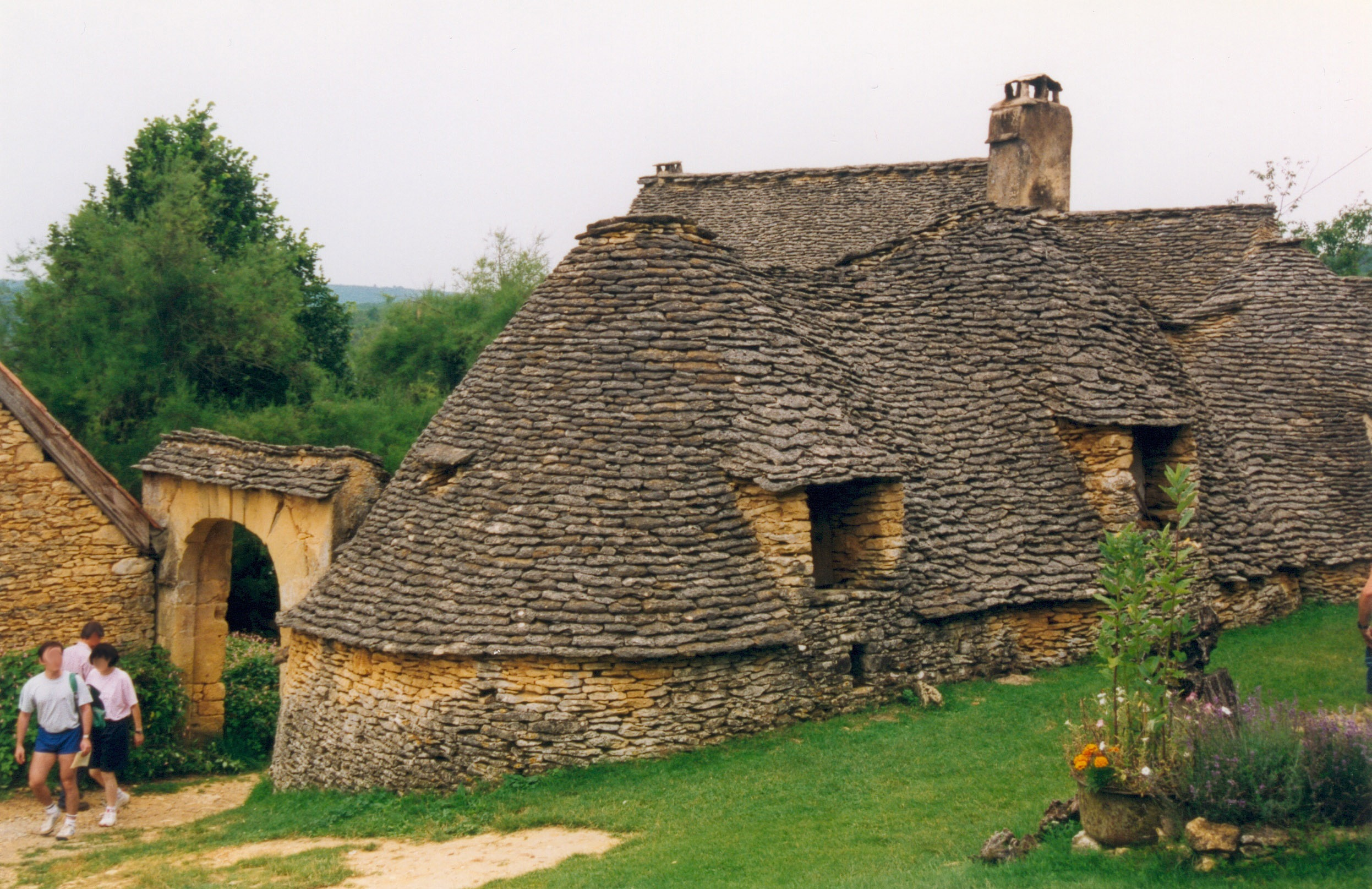 Les «Cabanes du Breuil» à Saint-André-d'Allas en Dordogne (France). Le porche d'entrée de l'ancienne ferme et le premier groupe de cabanes. Photographie prise par Patrick GIRAUD / The site known as "Cabanes du Breuil" at Saint-André-d'Allas, Dordogne (France). The gateway of the ancient farmhouse and the first group of stone huts. Photograph taken by Patrick GIRAUD.